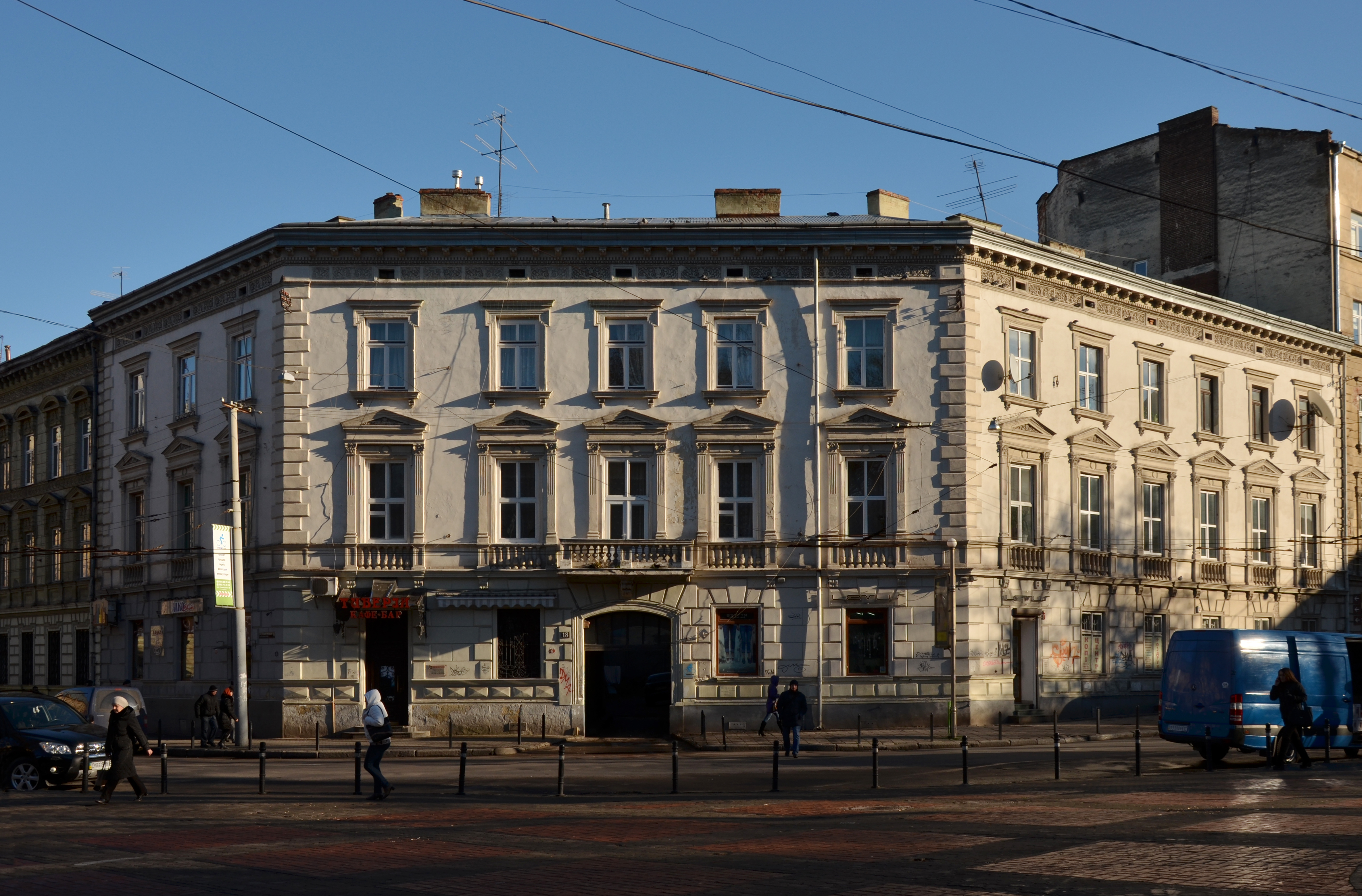 Будинок № 18 на вулиці Словацького у Львові. Збудований 1876 року. Архітектор Емануель Галль.